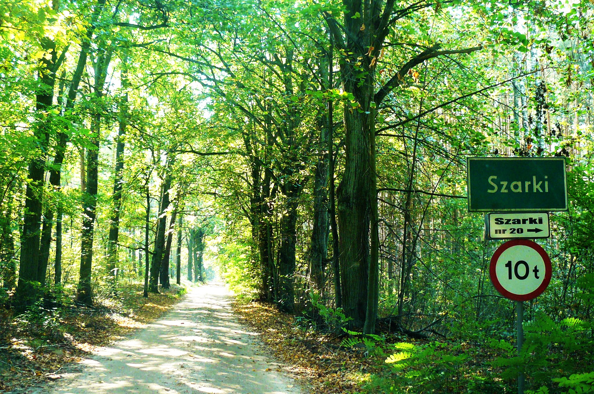 Szraki, wjazd od Borui Kościelnej.